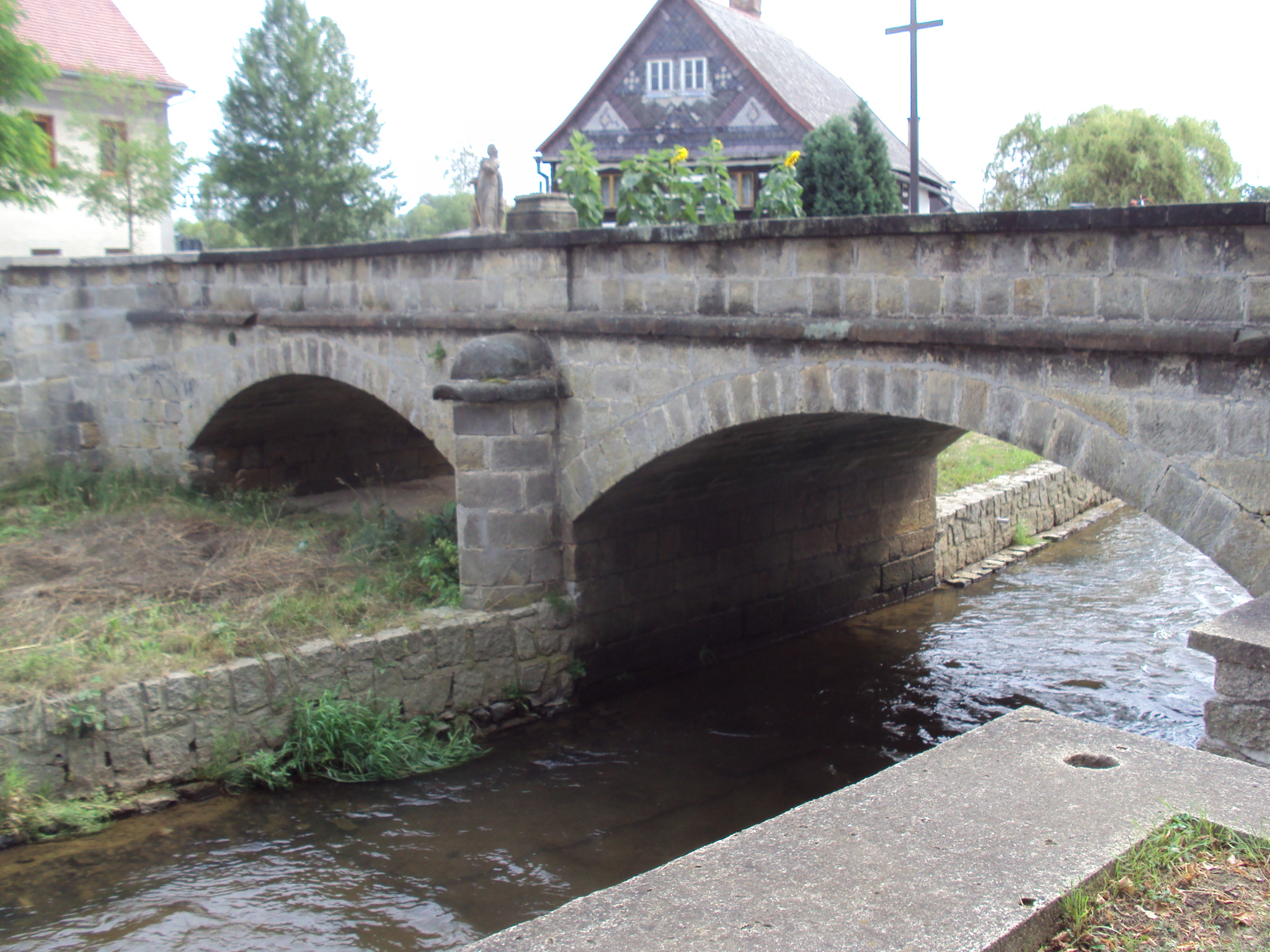 Most přes Svitávku, ulice Mostecká v Zákupech